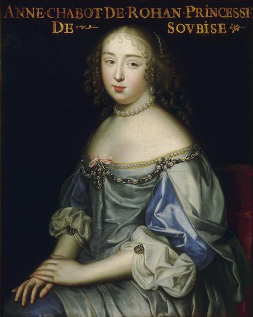 Anne de Rohan-Chabot, princesse de Soubise (1648-1709). Dame du Palais de la Reine Marie-Thérèse. Epouse en 1663 de François de Rohan, Prince de Soubise (1648-1709)